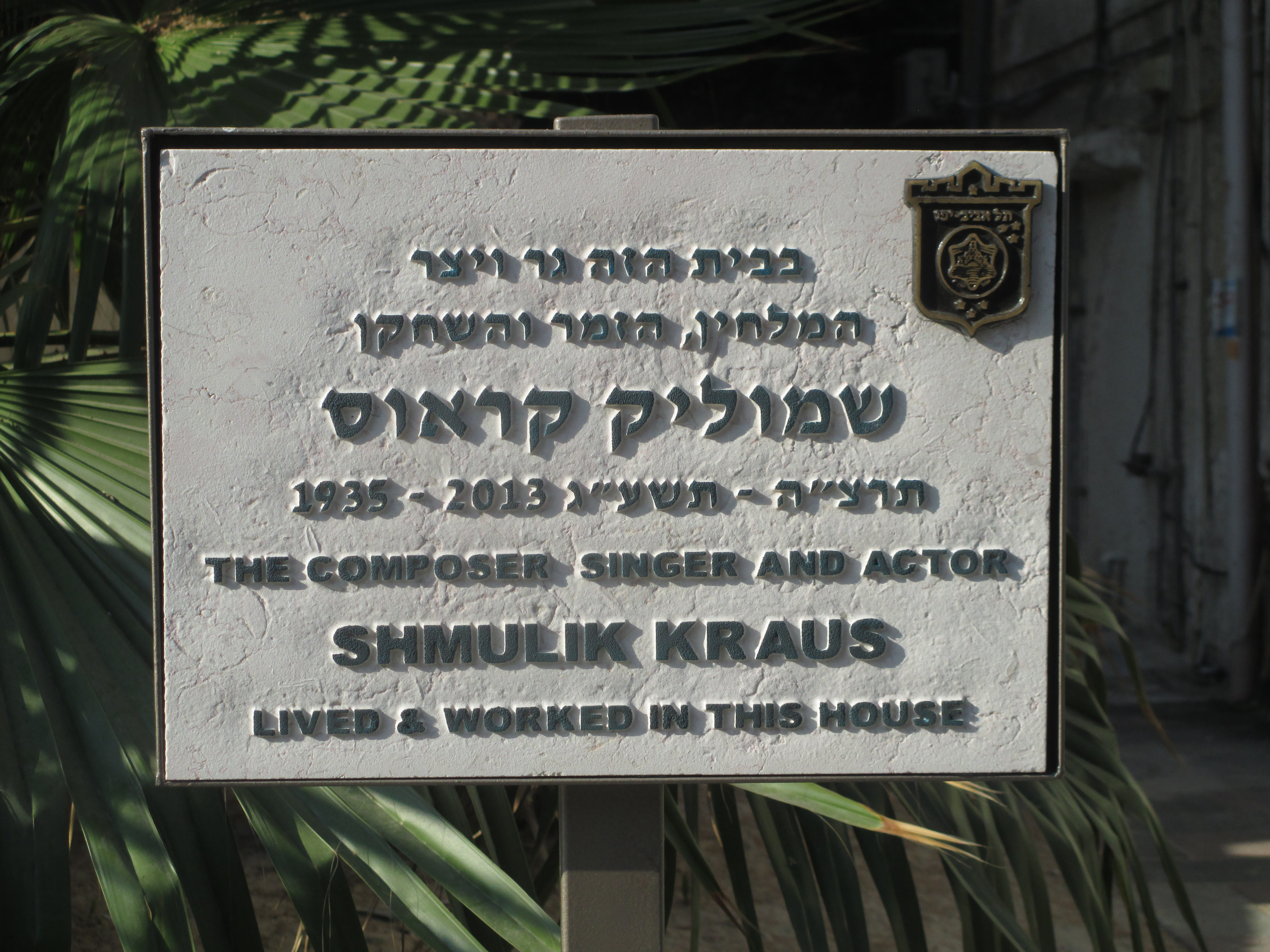 לוחית זיכרון בכניסה לביתו של שמוליק קראוס ברחוב טרומפלדור 14 בתל אביב